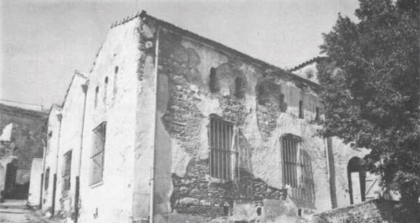 Mosquée Djamâa Aâdham de la Casbah de Béjaïa مسجد الجامع الأعظم في قصبة بجاية